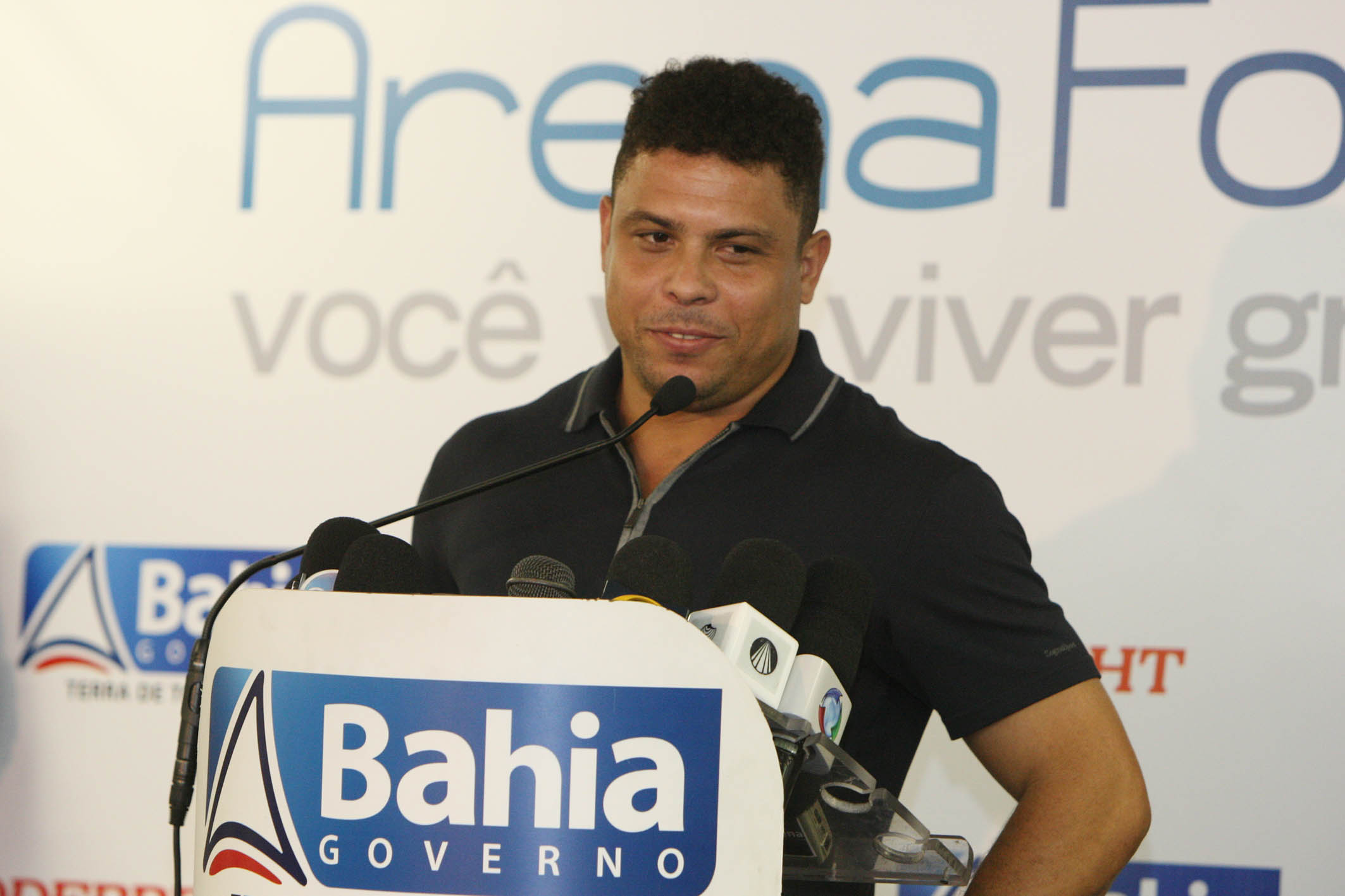 Visita da FIFA às obras da Arena Fonte Nova. Na foto: Ronaldo Nazário, Membro do Conselho Administrativo do Comitê Organizador Local da Copa do Mundo da FIFA Brasil 2014 Foto: Mateus Pereira/Secom